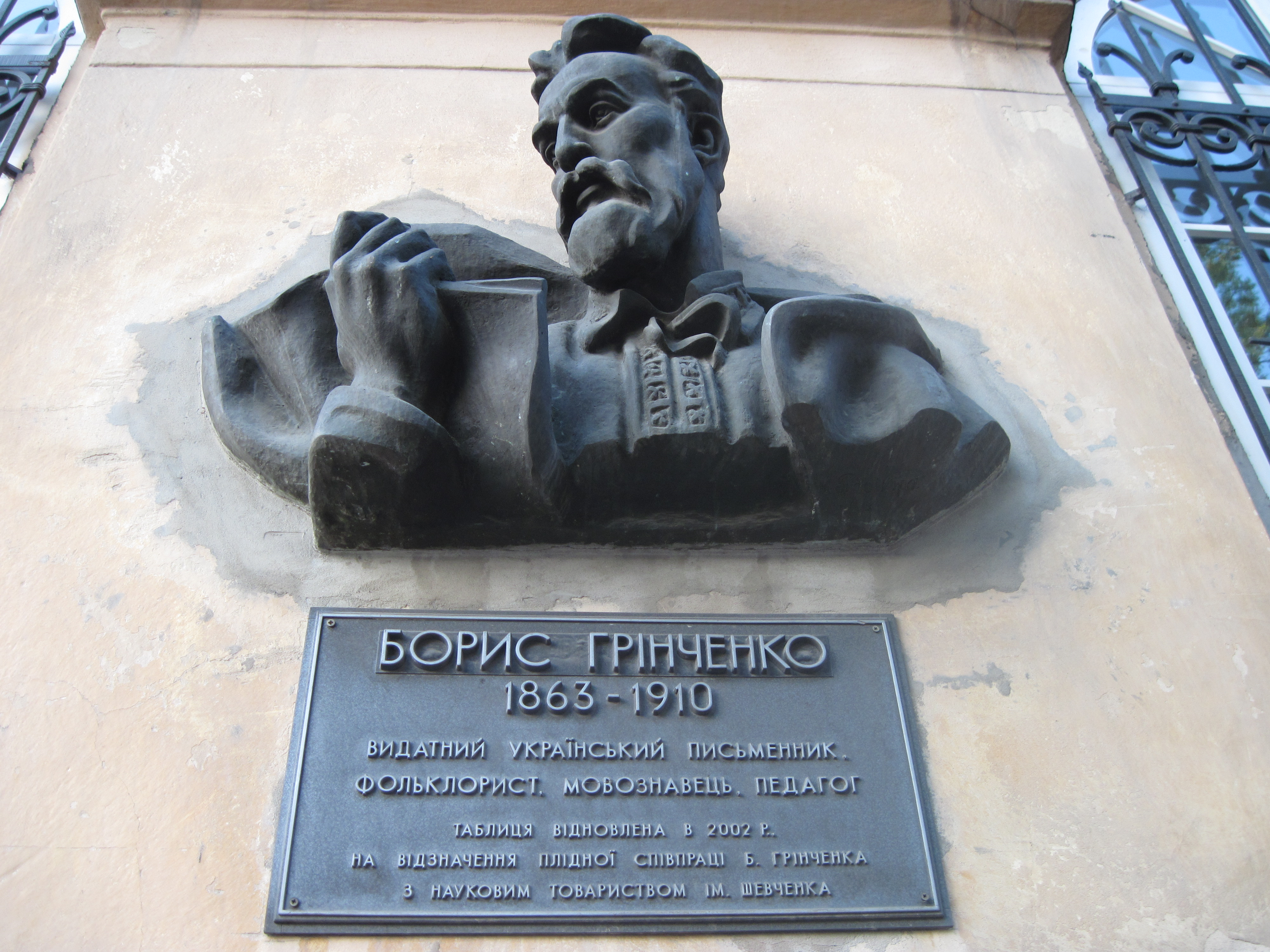 Пам'ятна дошка, Львів